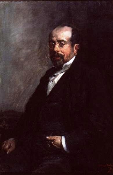 Retrato del pintor español Antonio Muñoz Degrain (1840-1924).